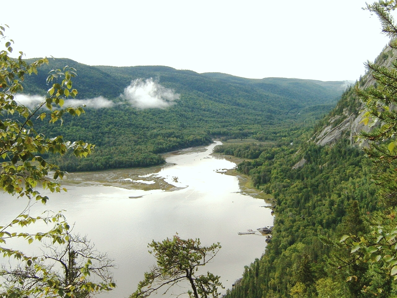 Baie Éternité vu du sentier de la statue dans le Parc national du Saguenay